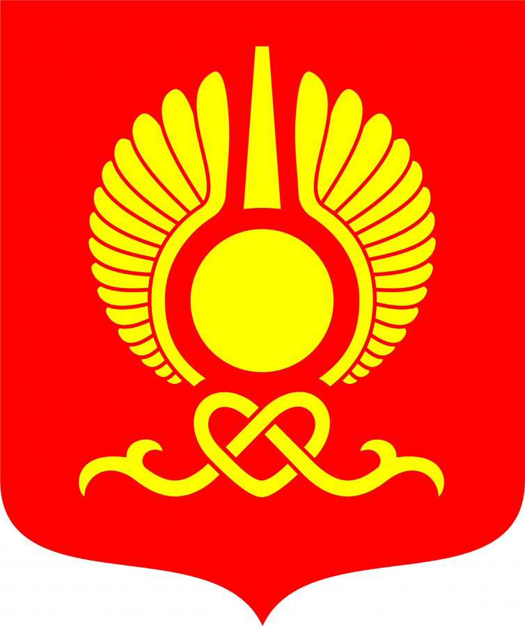 Новый герб города Кызыл (2016)